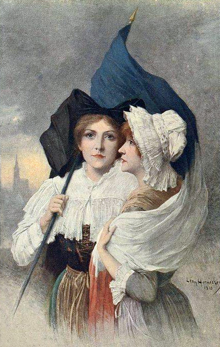 La patrie retrouvée / Léon Hornecker. 1919. Bibliothèque nationale et universitaire de Strasbourg